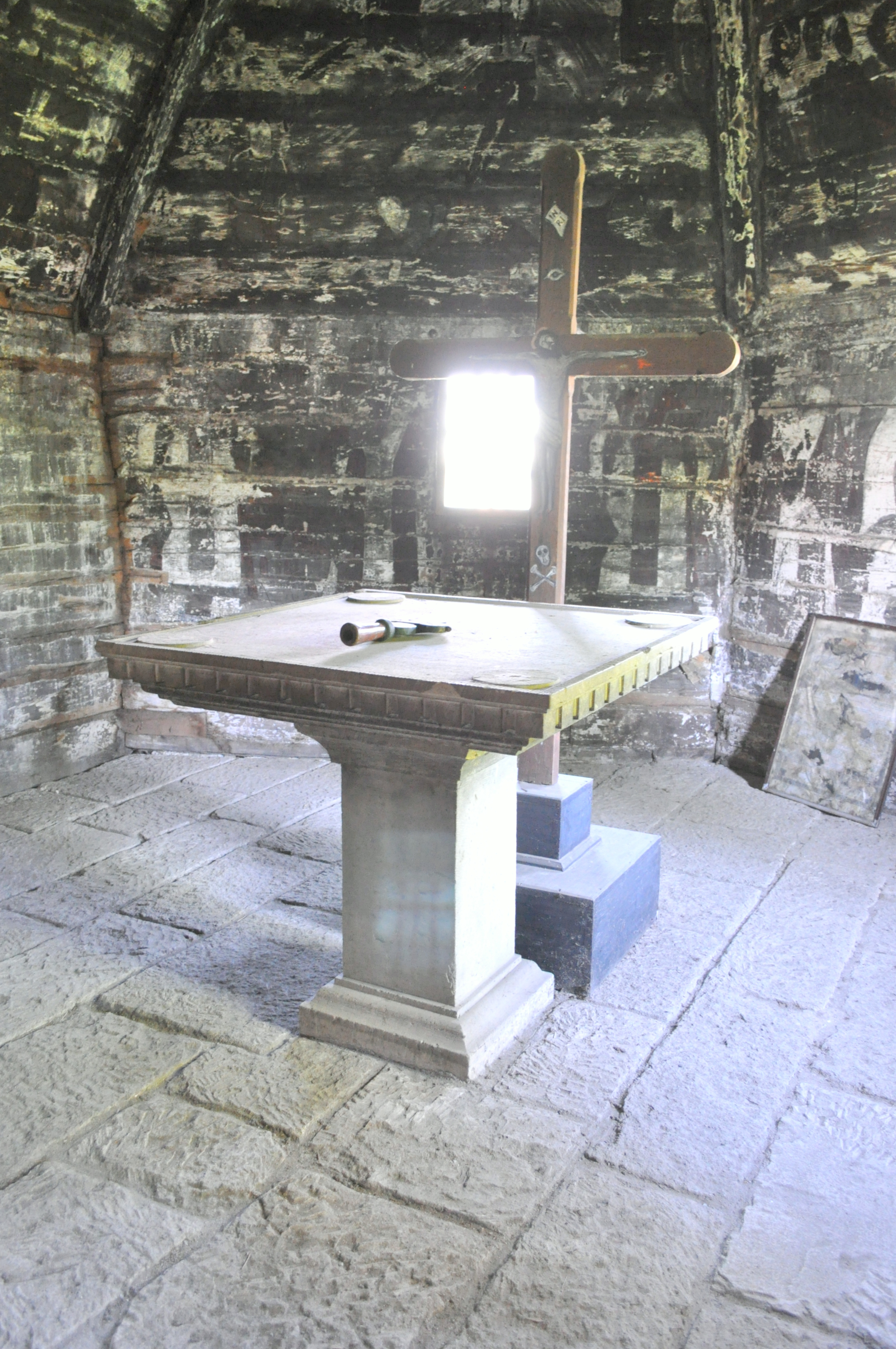 Biserica de lemn din Apahida, județul Cluj